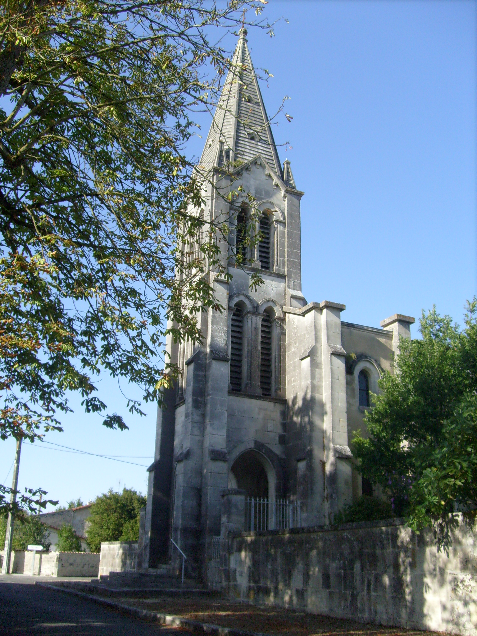 Clocher de l'église de Brives-sur-Charente